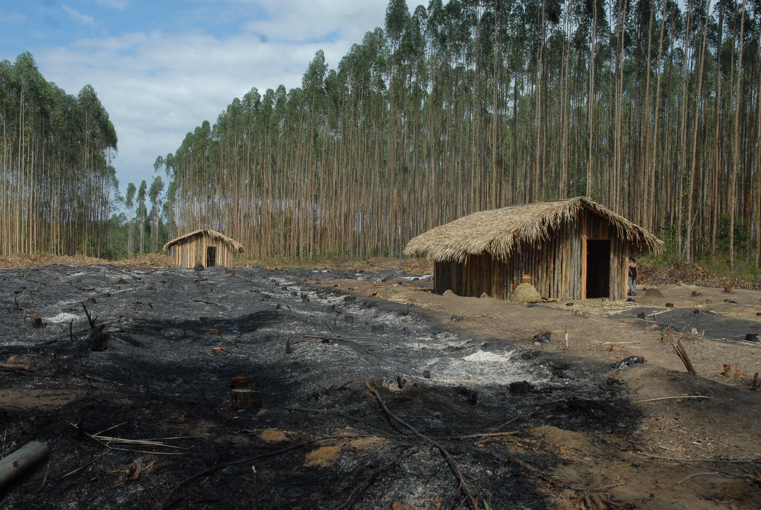 Índios retomam suas terras em meio a plantação de eucalipto no Espírito Santo, Brasil